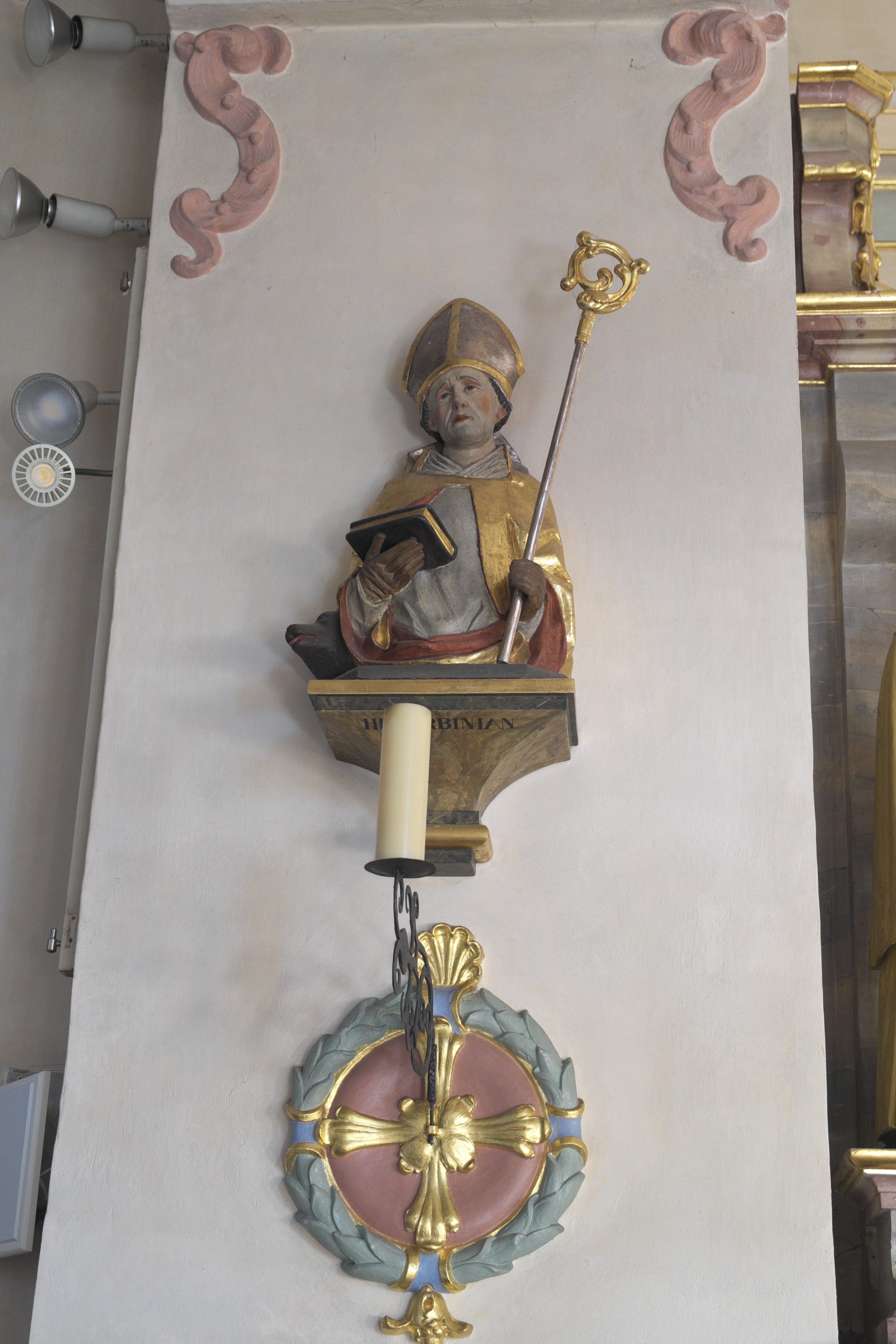 Katholische Pfarrkirche St. Laurentius in Petershausen im Landkreis Dachau (Bayern/Deutschland), Büste des heiligen Korbinian